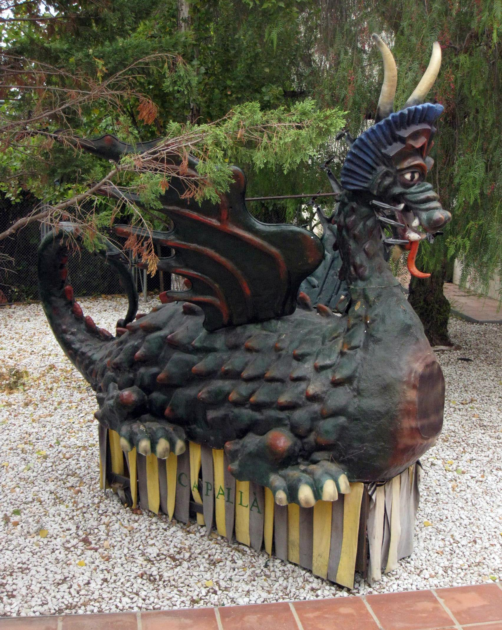 Can Jussana - Torre Jussana (Barcelona)